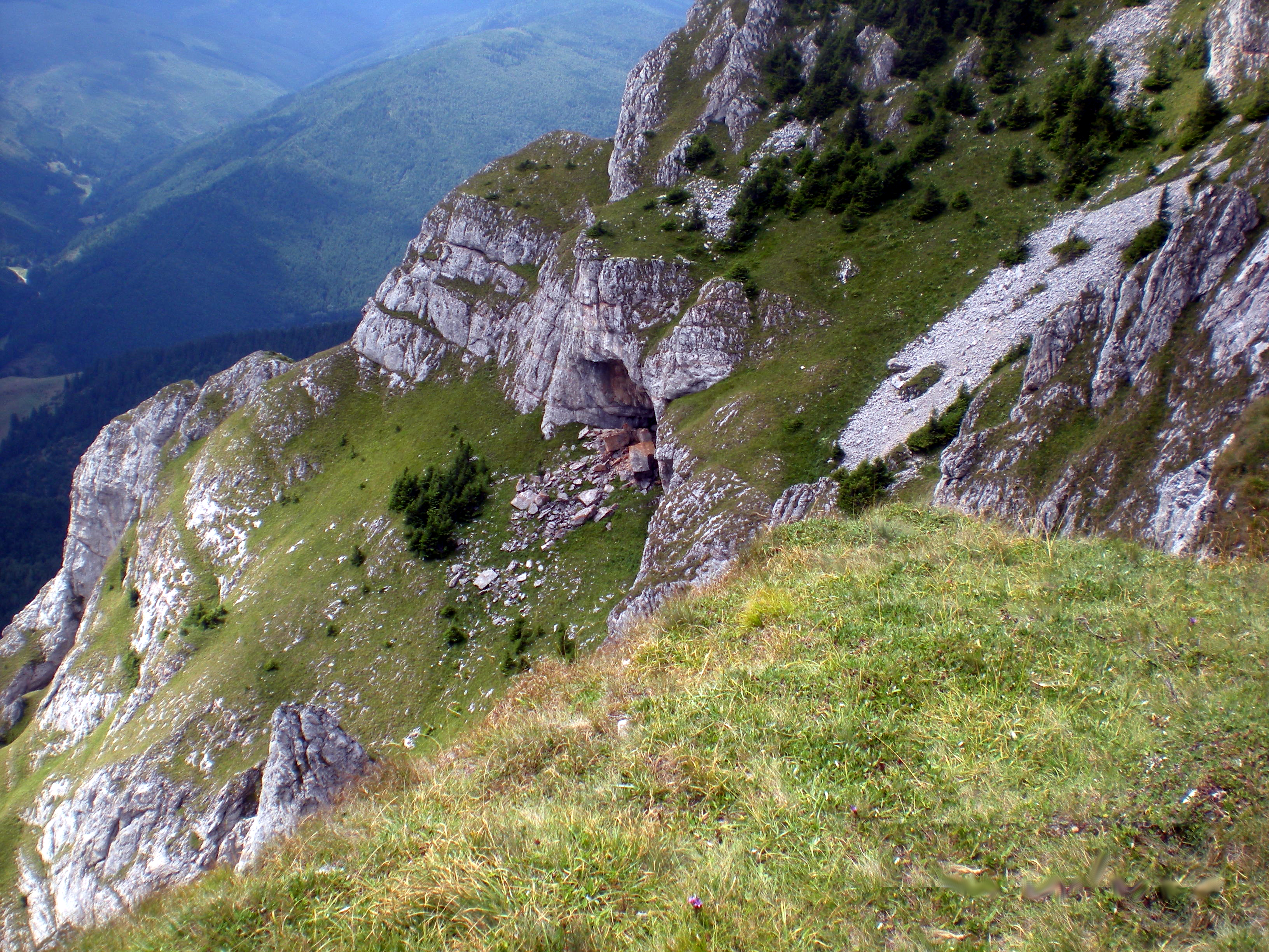 Nagy-Hagymás hegység, sziklarészlet